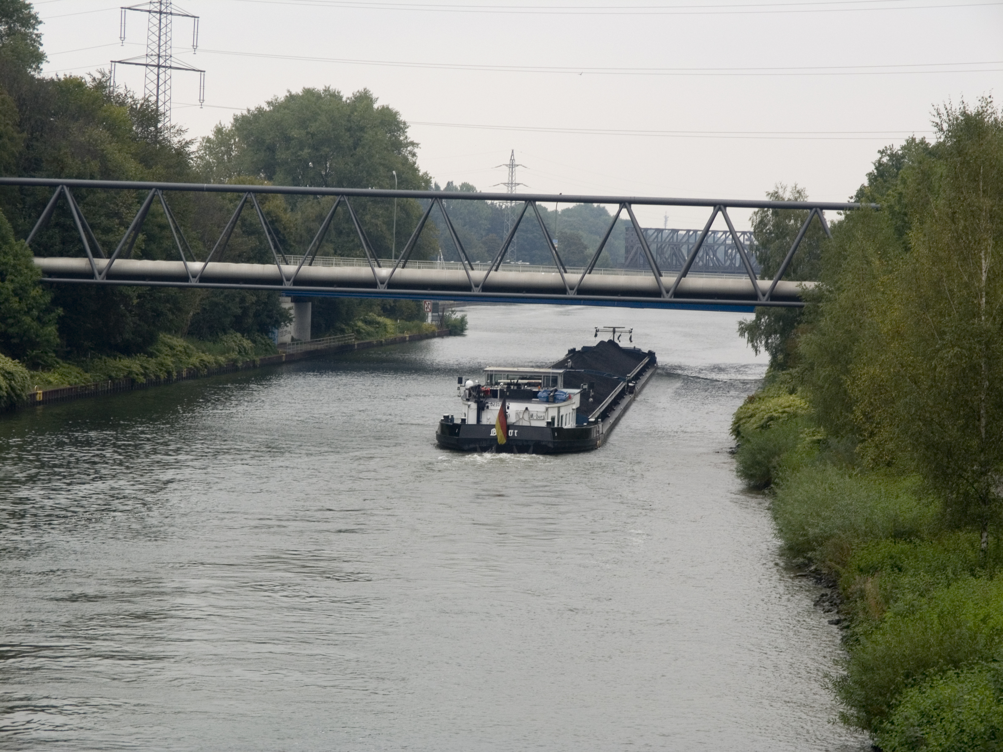 Der Rhine-Herne-Kanal in Gelsenkirchen